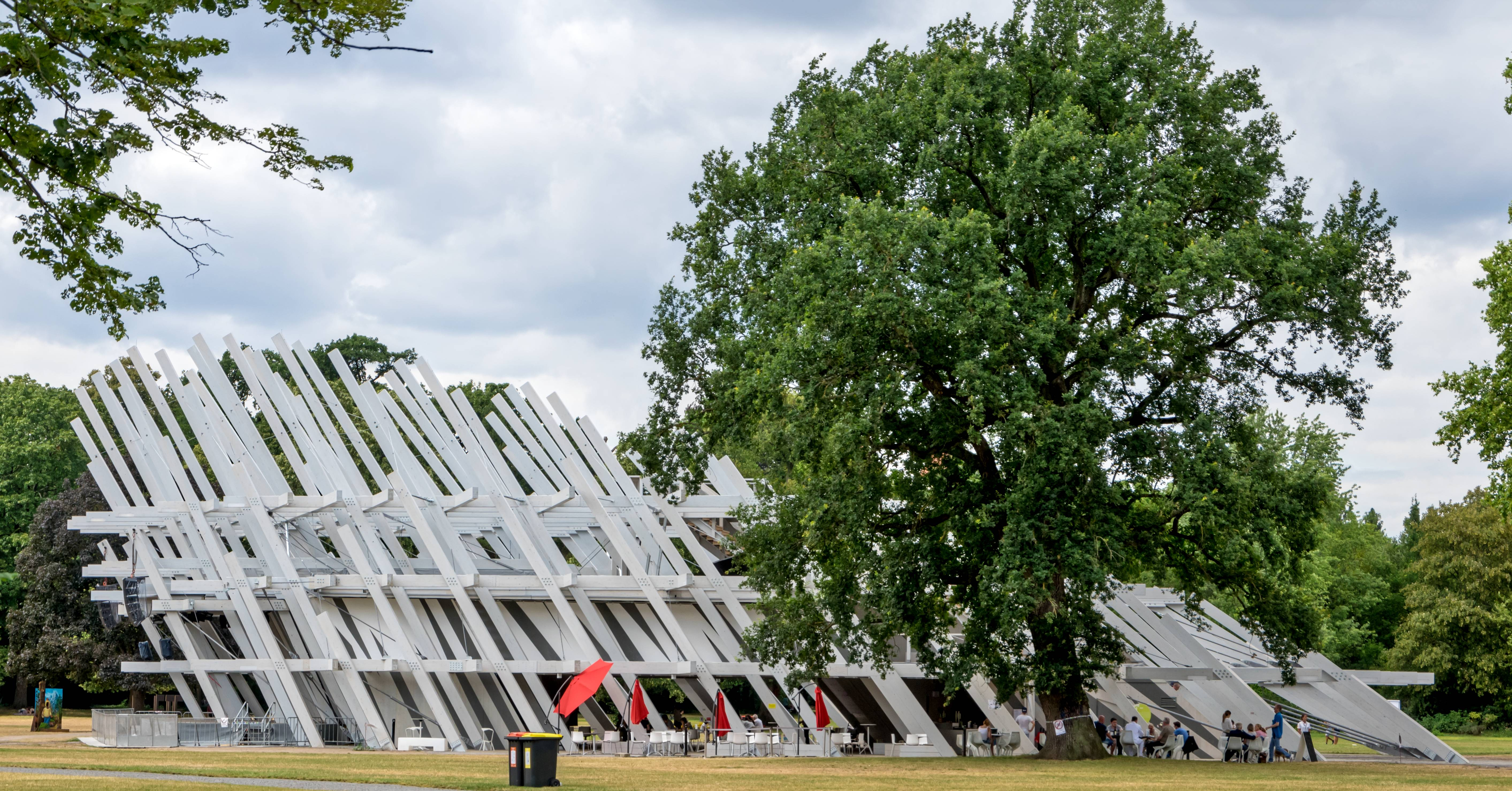 Der Pavillion KA300 im Schloßgarten von Karlsruhe